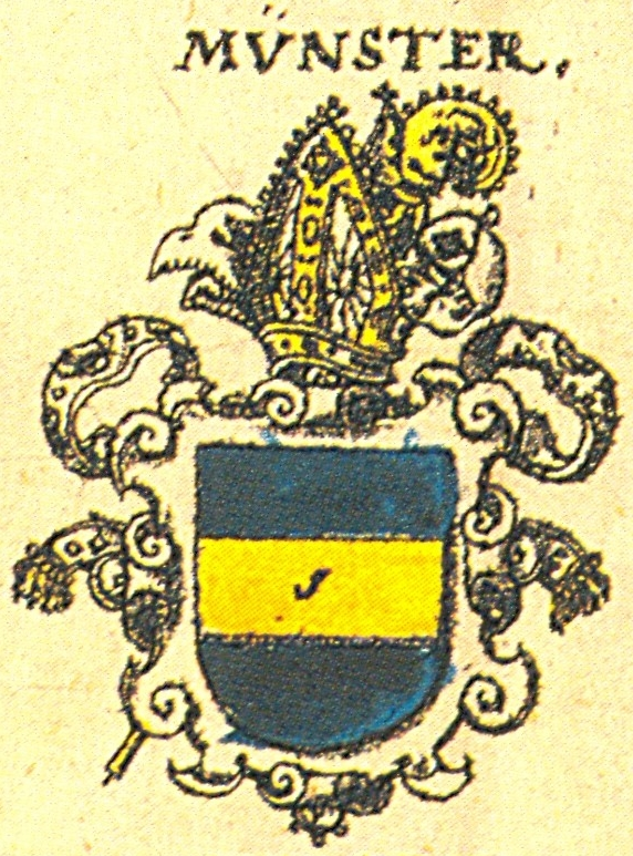 Wappen des Bistums Münster nach Siebmachers Wappenbuch